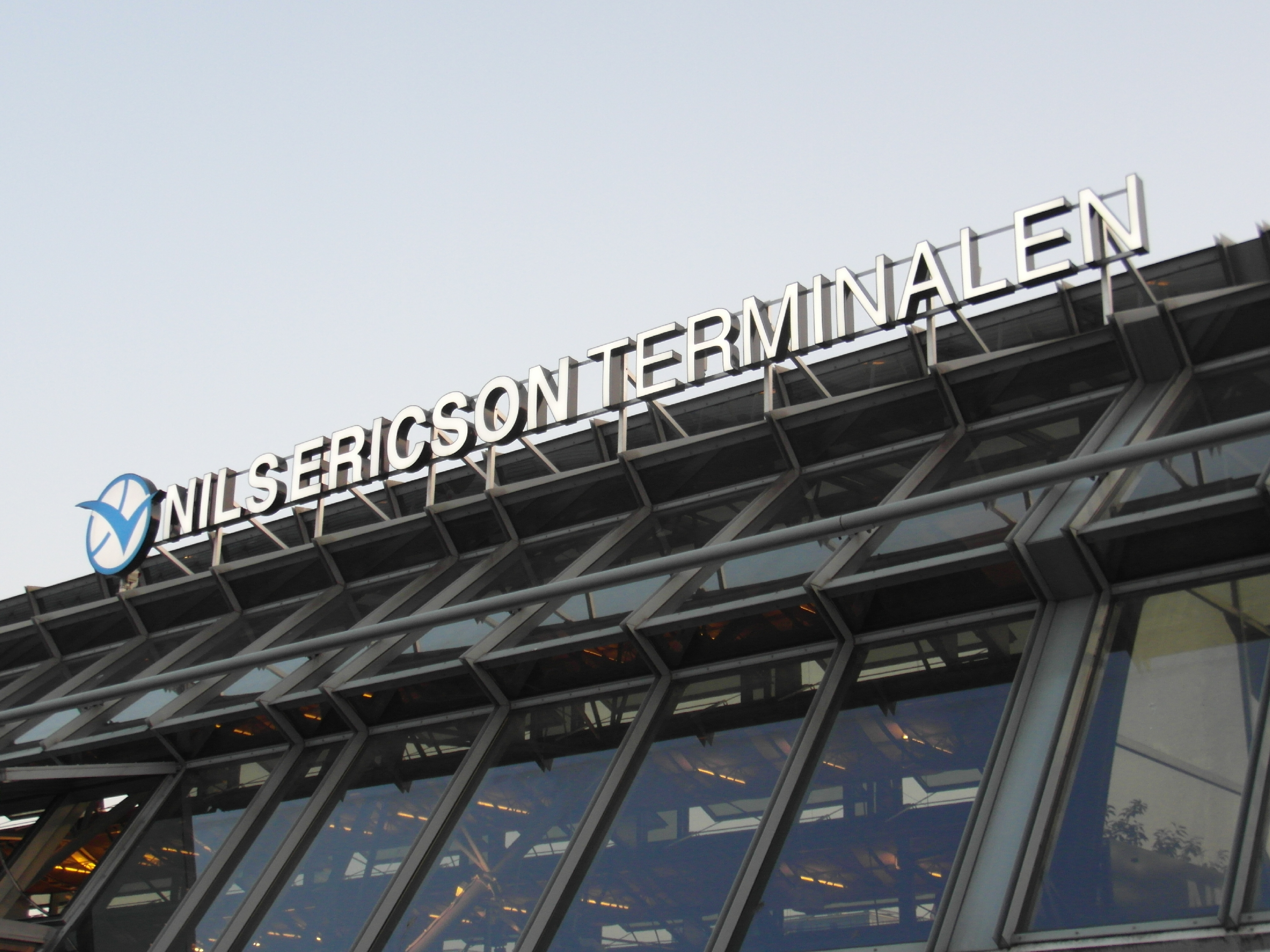 Göteborg - Bussterminalen - Nils Ericson Terminalen